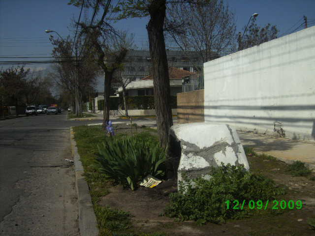 Animita de hombre desconocido asesinado en calles Zañartu con Nelson (Av. Pedro de Valdivia alt. 2000) en Ñuñoa, Santiago de Chile